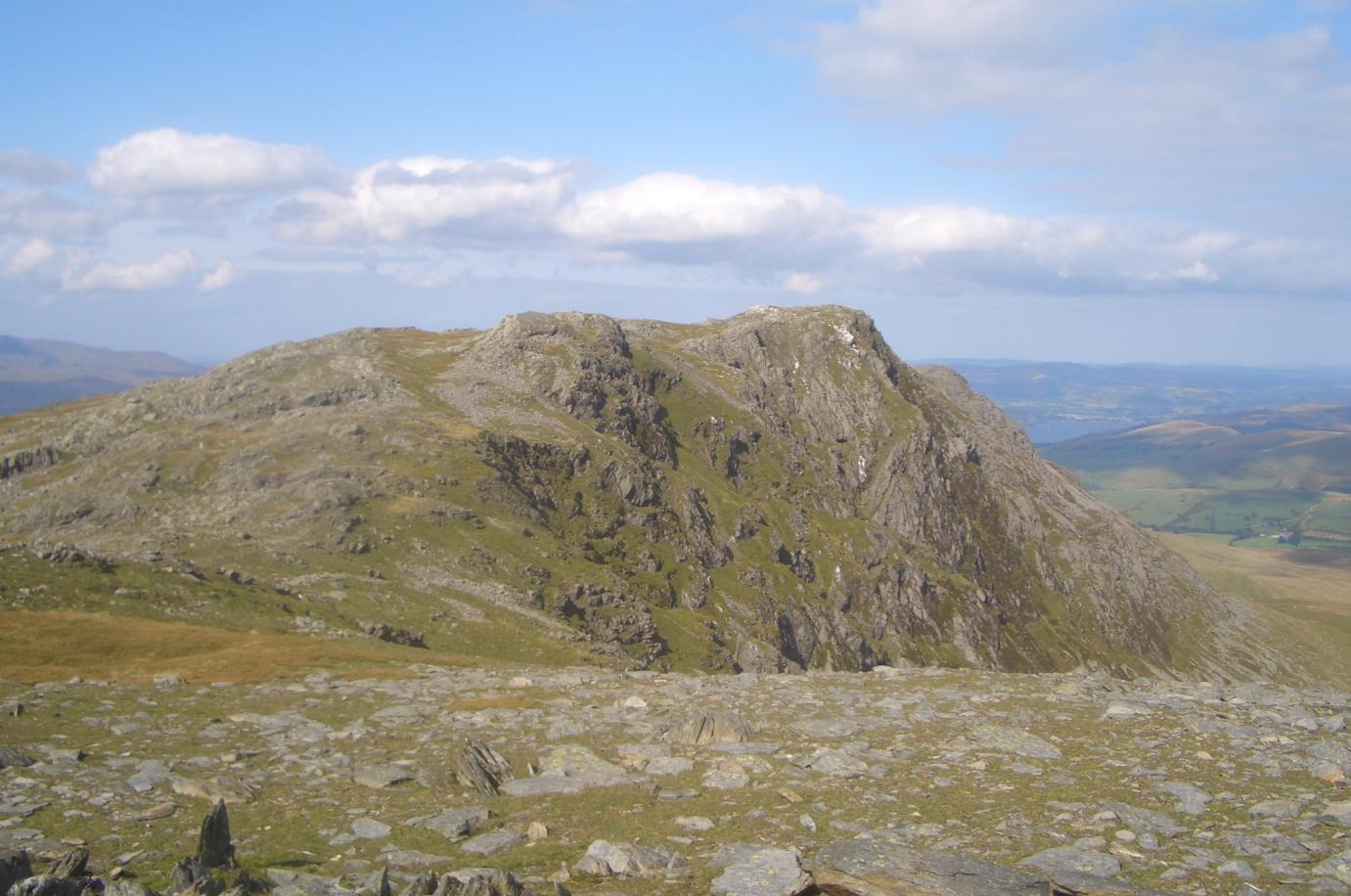 aran benllyn